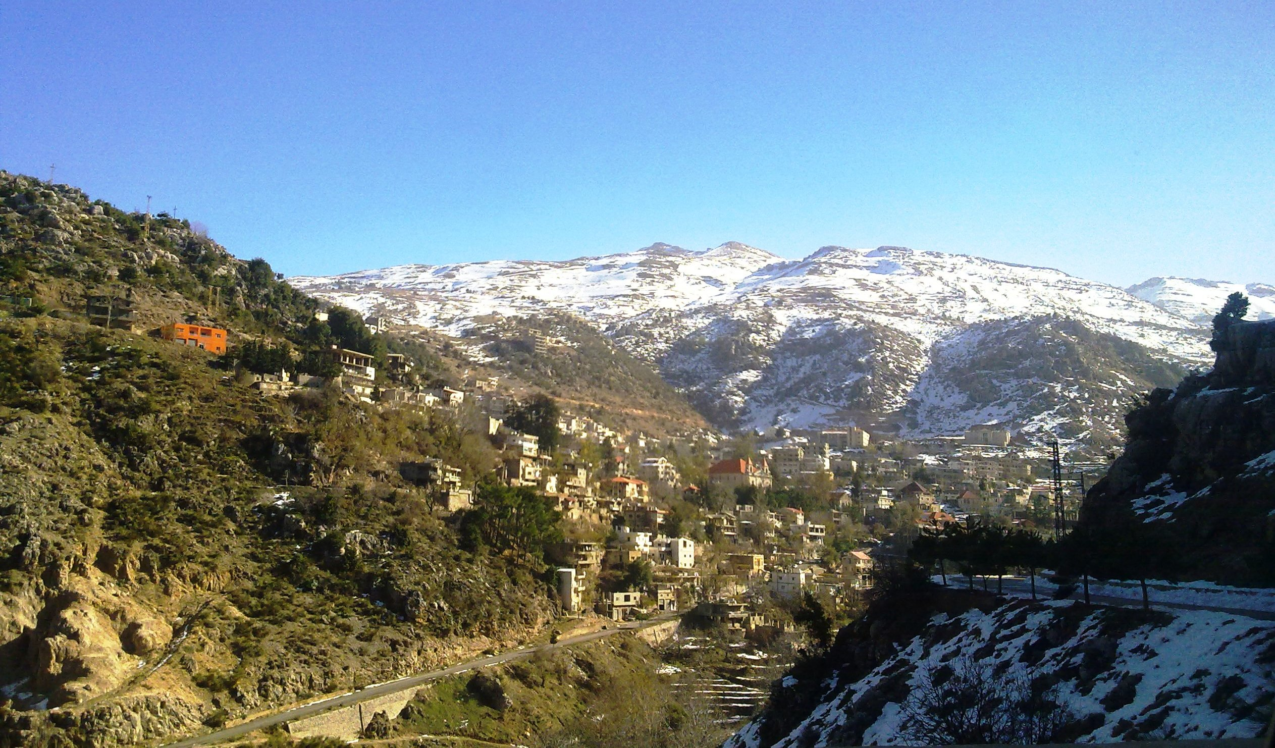 Foto mostrando la aldea Tannurin El Fawqa